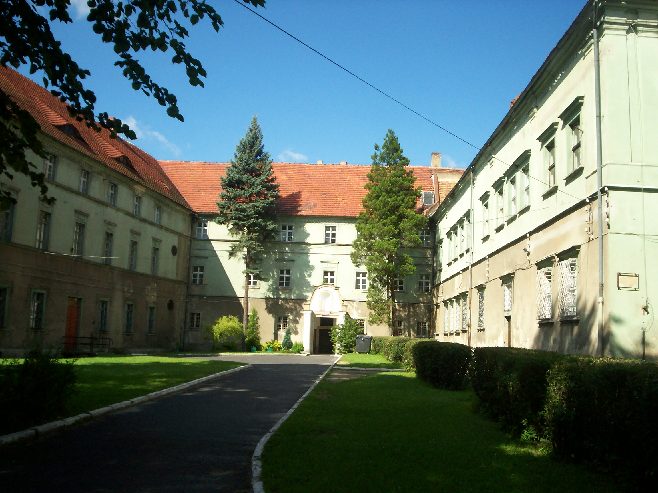 Lubomierz, klasztor Benedyktynek (zabytek nr A/2047/1028 z 15.01.1964).